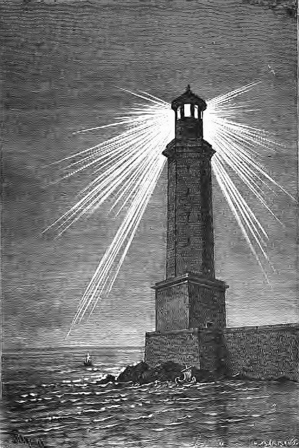 Le Phare d'Alexandrie, selon gravure du XIXè siècle